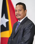 José Virgílio Rodrigues Ferreira, Abgeordneter des Nationalparlaments Osttimros